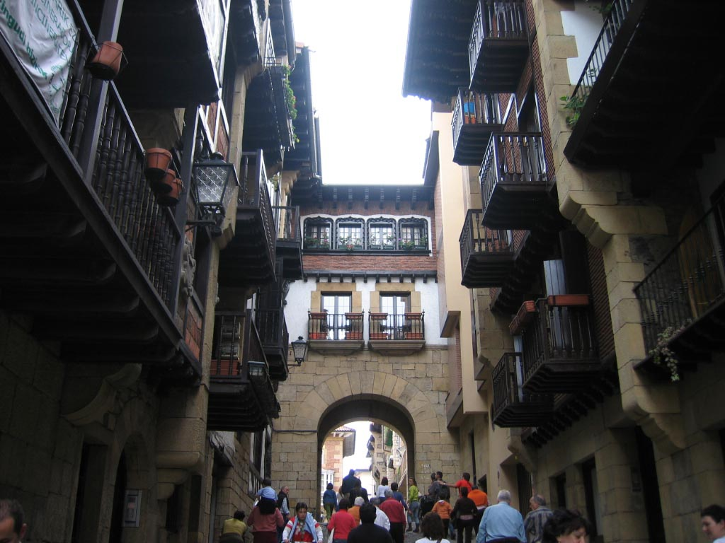 Fuenterrabía (Guipúzcoa)-Calle Santiago de Compostela